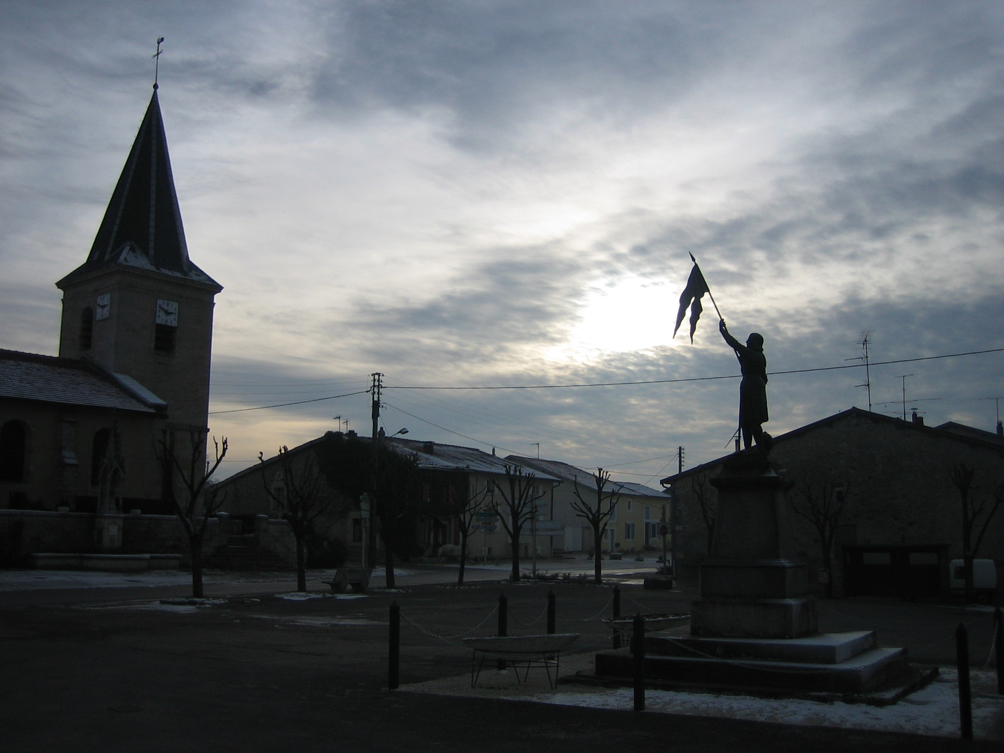 D'après Alexandre-Mathurin Pêche (1872-1955): Monument commémoratif surmonté d'une statue de Jeanne d'Arc, copie d'après original (fonderie de Tusey) érigé en 1899 à Albi. Statue en pied en armure portant épée et étendard, regard tourné vers l'étendard, le casque posé derrière le pied gauche, face à l'église de Villotte-sur-Aire, Meuse, Lorraine, France. [1]